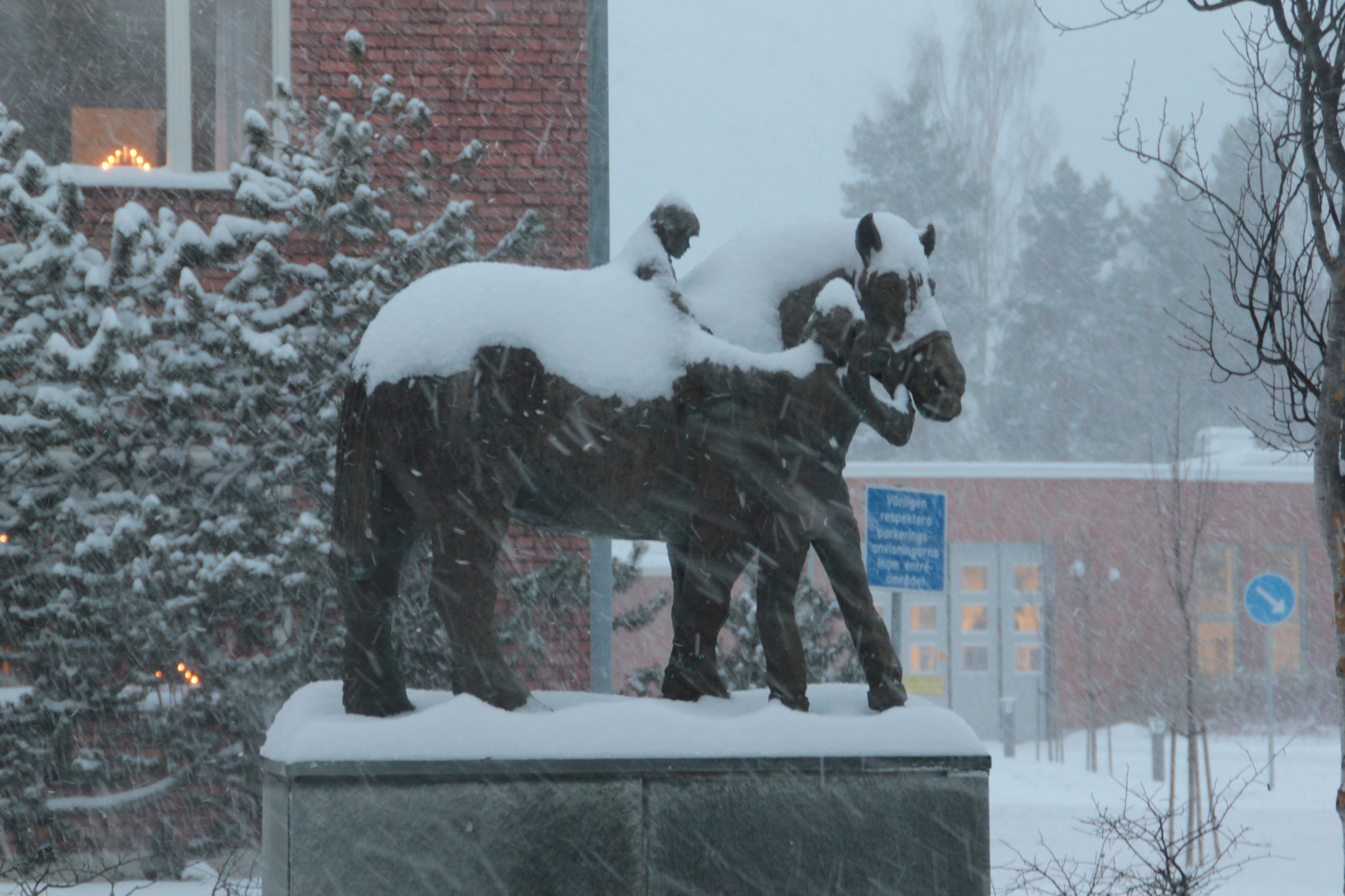 Häst med ridande barn av Per Nilsson-Öst 1979, utanför Mora lasarett, nära huvudentrén. Mora, Dalarnas län, Sverige